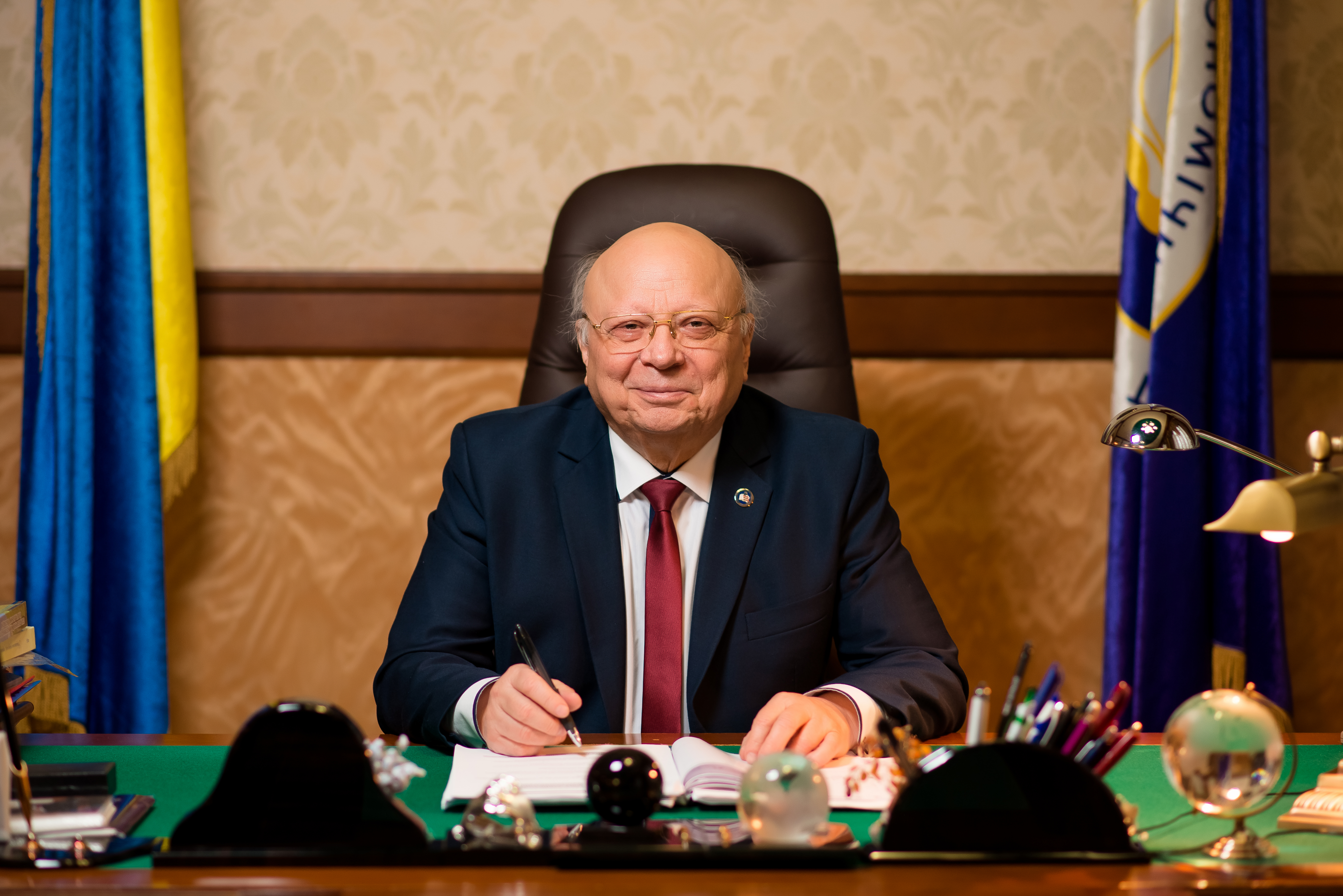 Ректор Харківського національного економічного університету імені Семена Кузнеця доктор економічних наук, професор Володимир Степанович Пономаренко. 2018 рік.